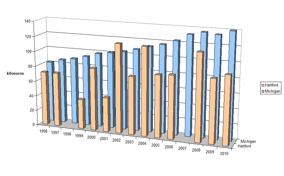 Coût moyen de la construction d'une habitation, à Hartford (Michigan) et dans l'Etat du Michigan (Etats-Unis).